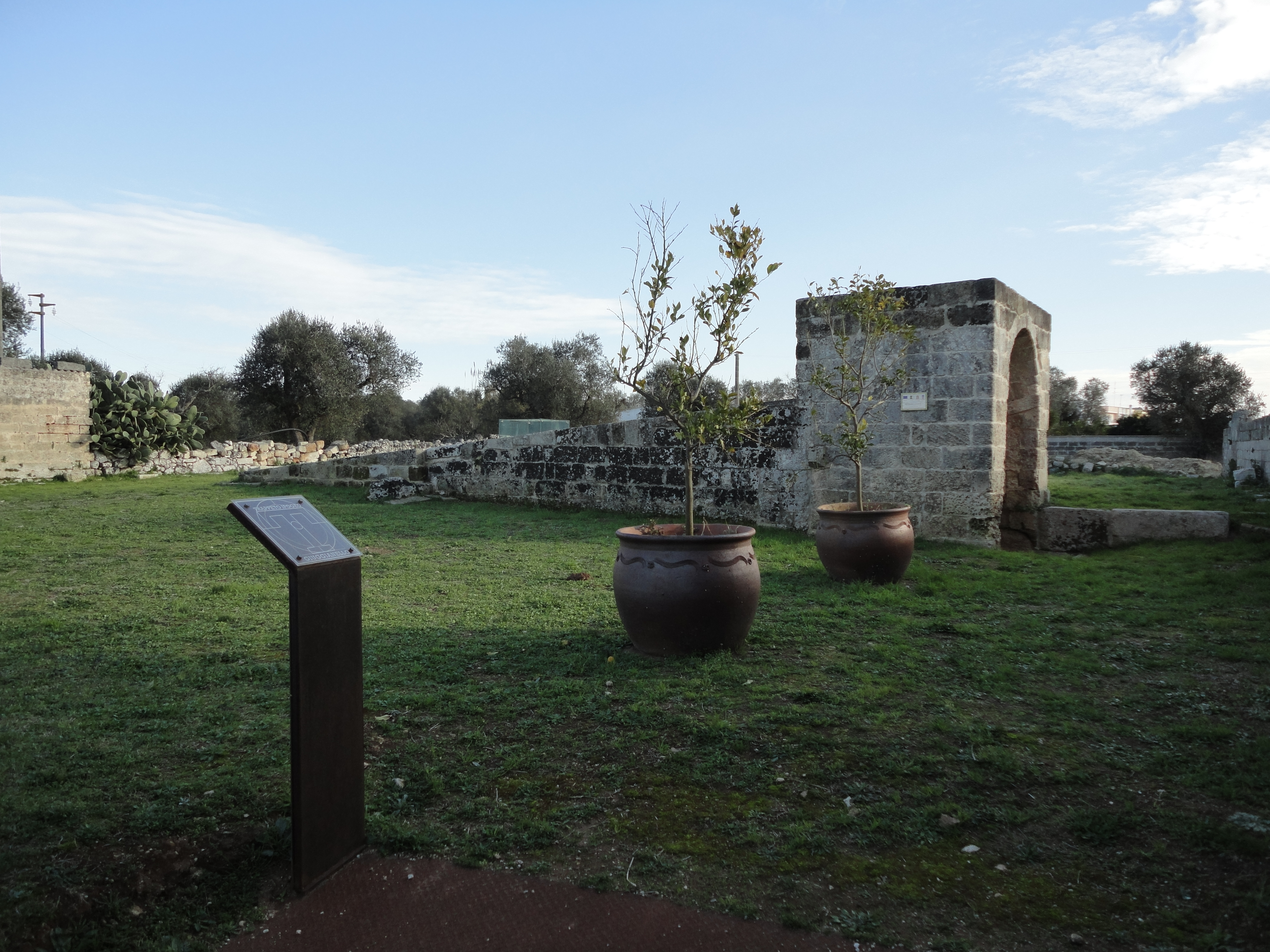 Frantoio Ipogeo Giuggianello, Lecce